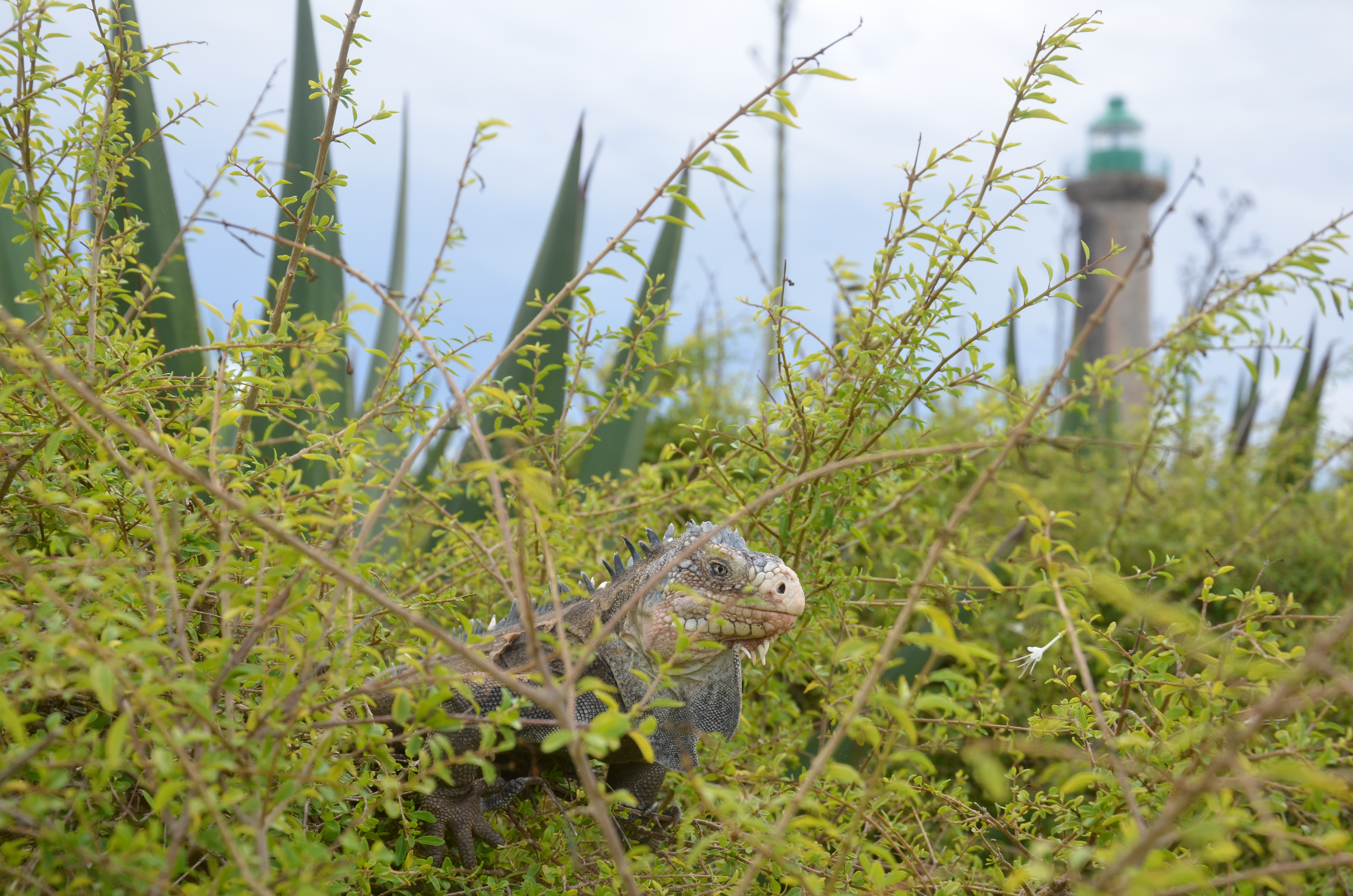 Iles de la Petite-Terre